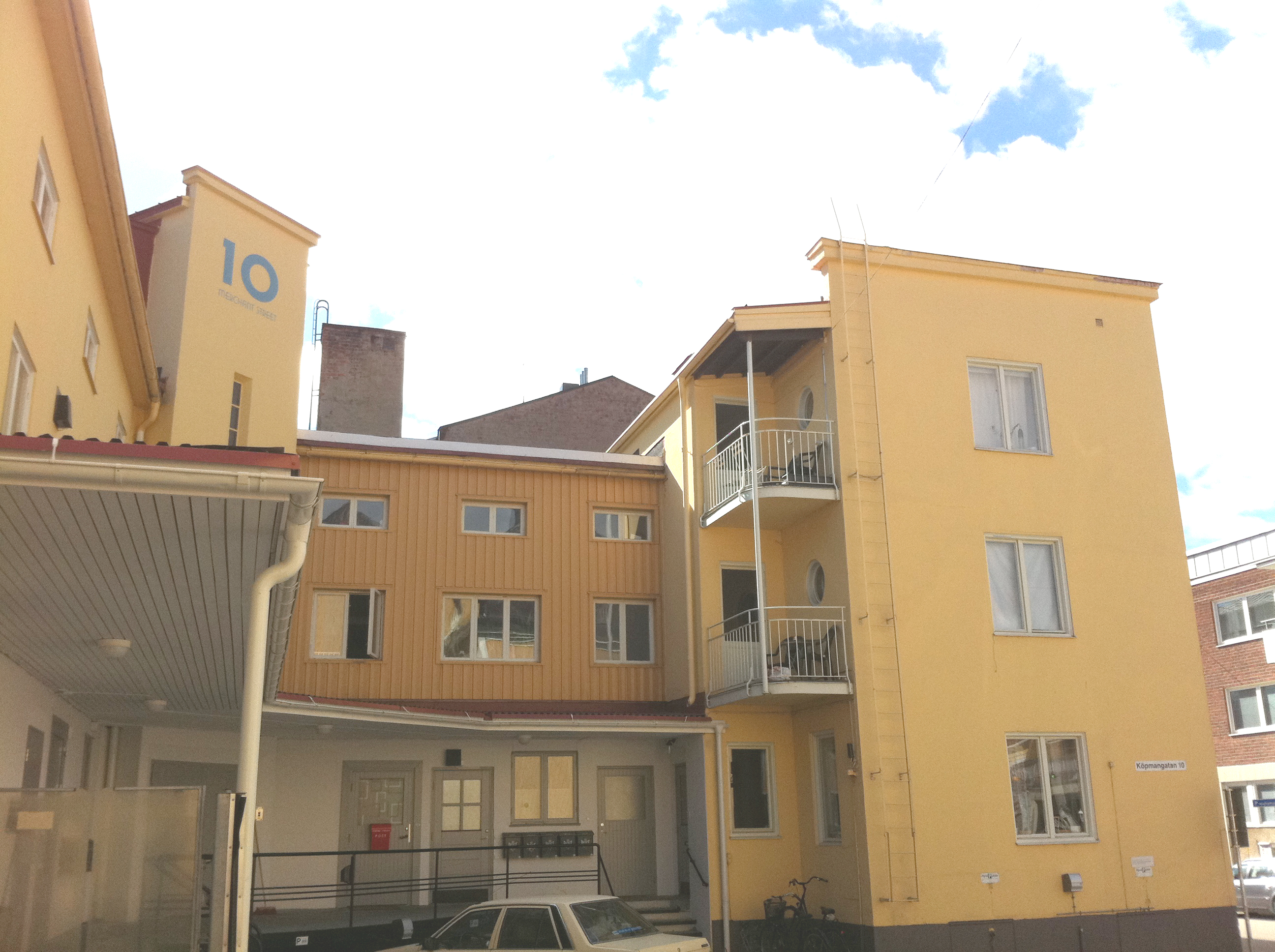 Bröderna Anderssons. Bostads- och kontorshus med lager uppfört av grossistfirman Bröderna Andersson. Bygglov gavs 1934. Ritningarna var gjorda av Birger Dahlberg, Skellefteå.